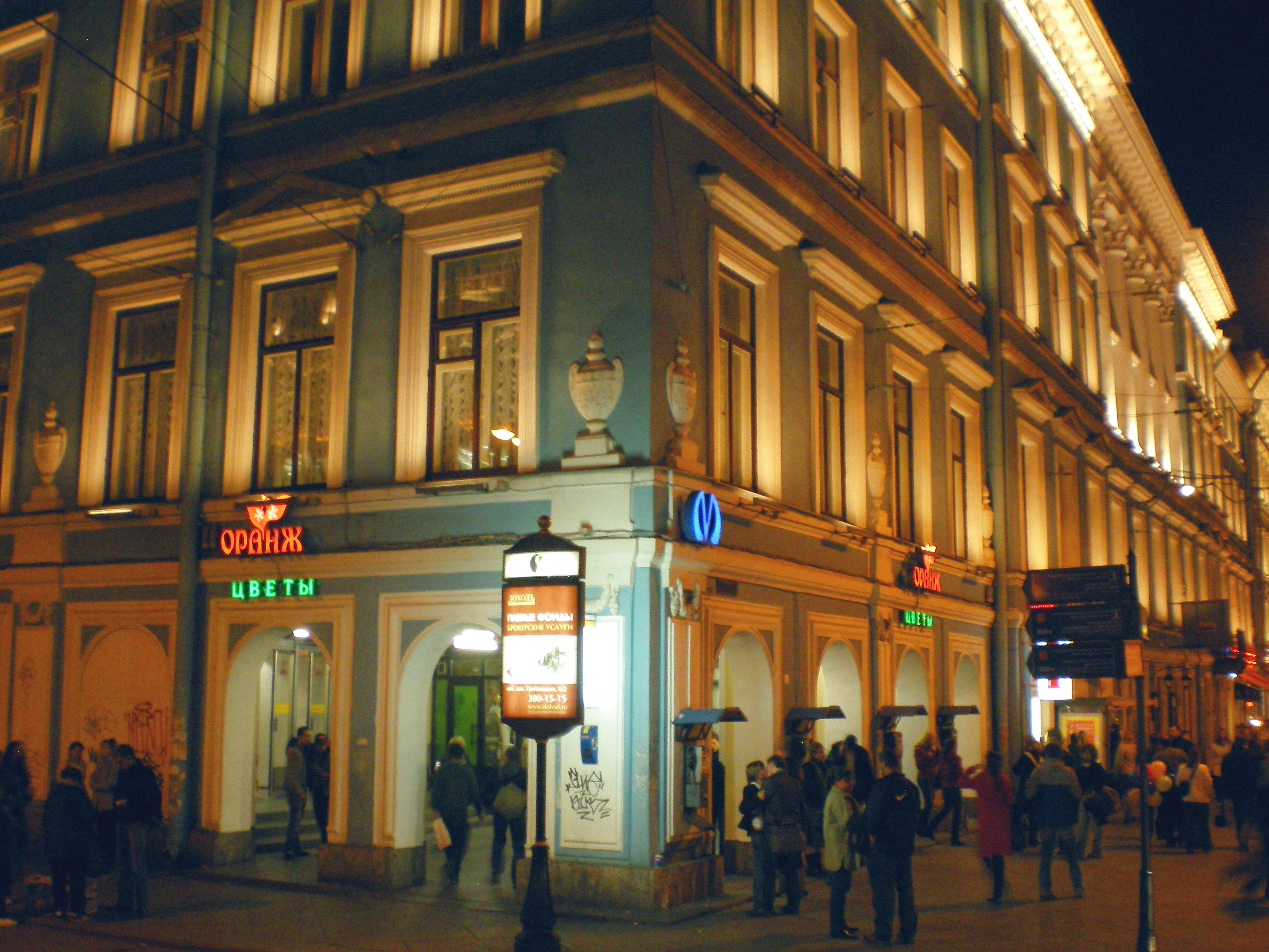 Невский проспект 30. Станция метро Гостиный двор